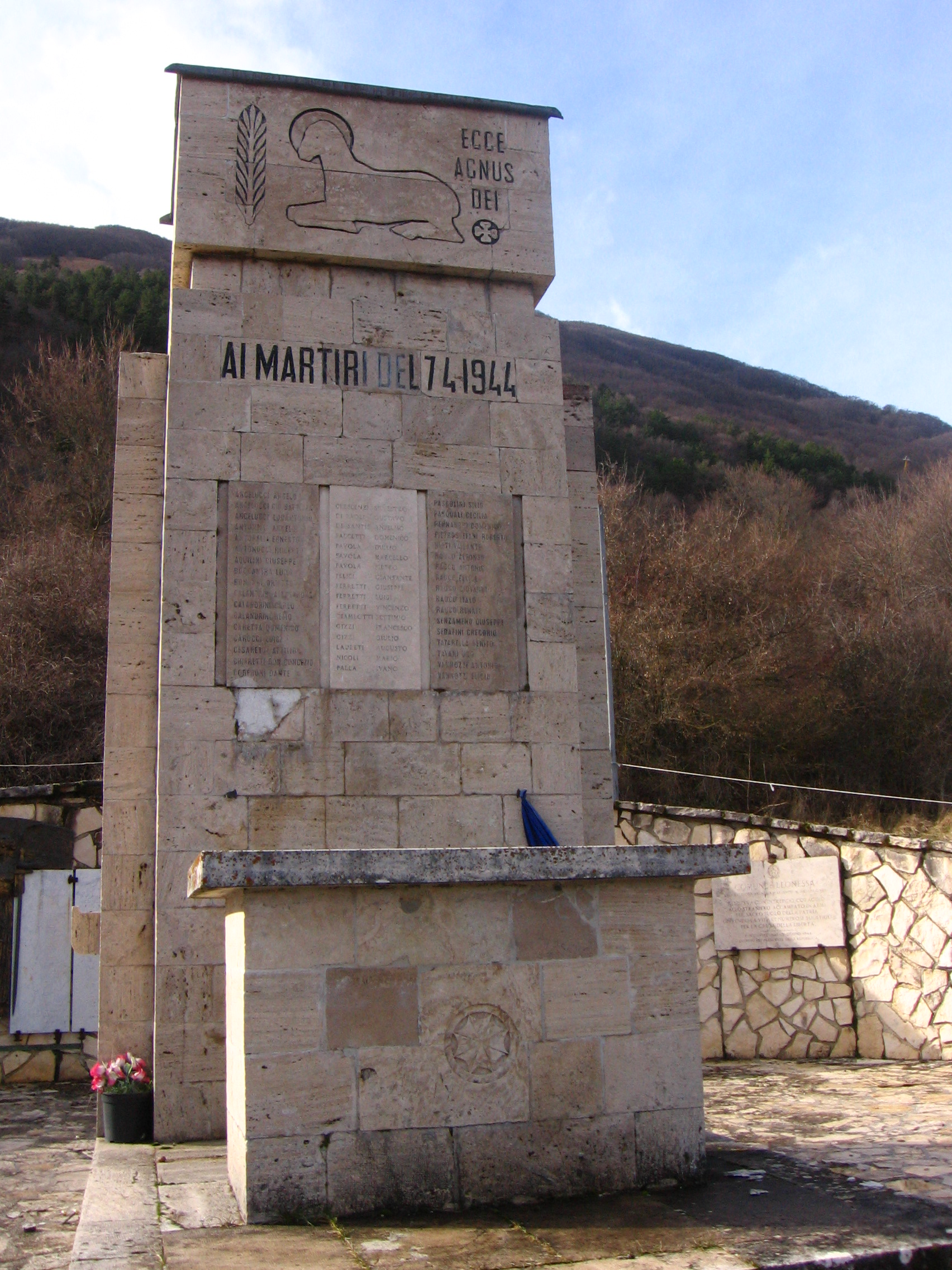 Il monumento del sacrario dedicato alle 51 vittime delle stragi naziste dell'aprile 1944 a Leonessa (RI).